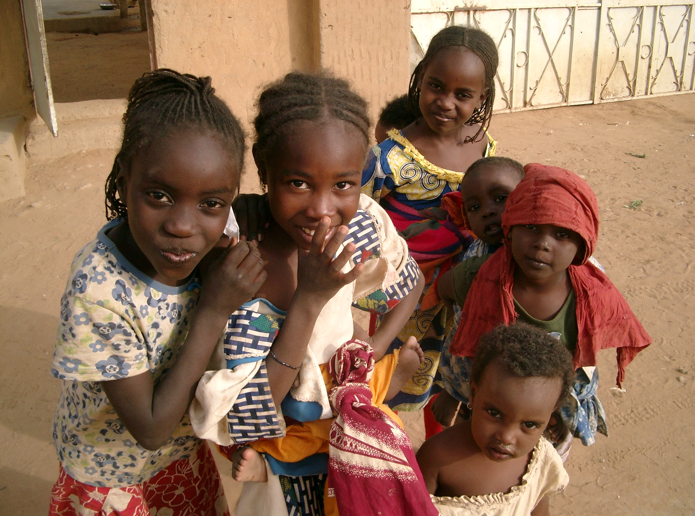 Children in Gao, Mali